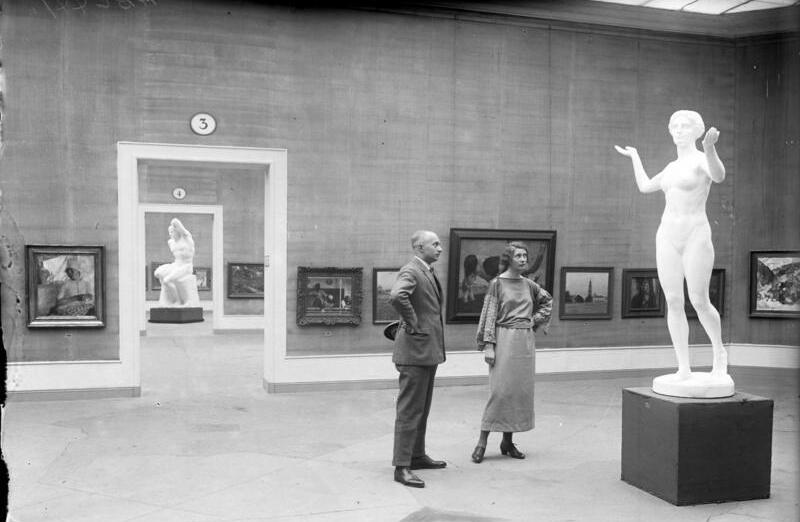 Eröffnung der großen Berliner Kunstausstellung am 31. Mai 1924. Blick in die Ausstellung. Rechts. : Figur "Feierlicher Tanz", hinten: "Dämmerung" von Otto Platzek.